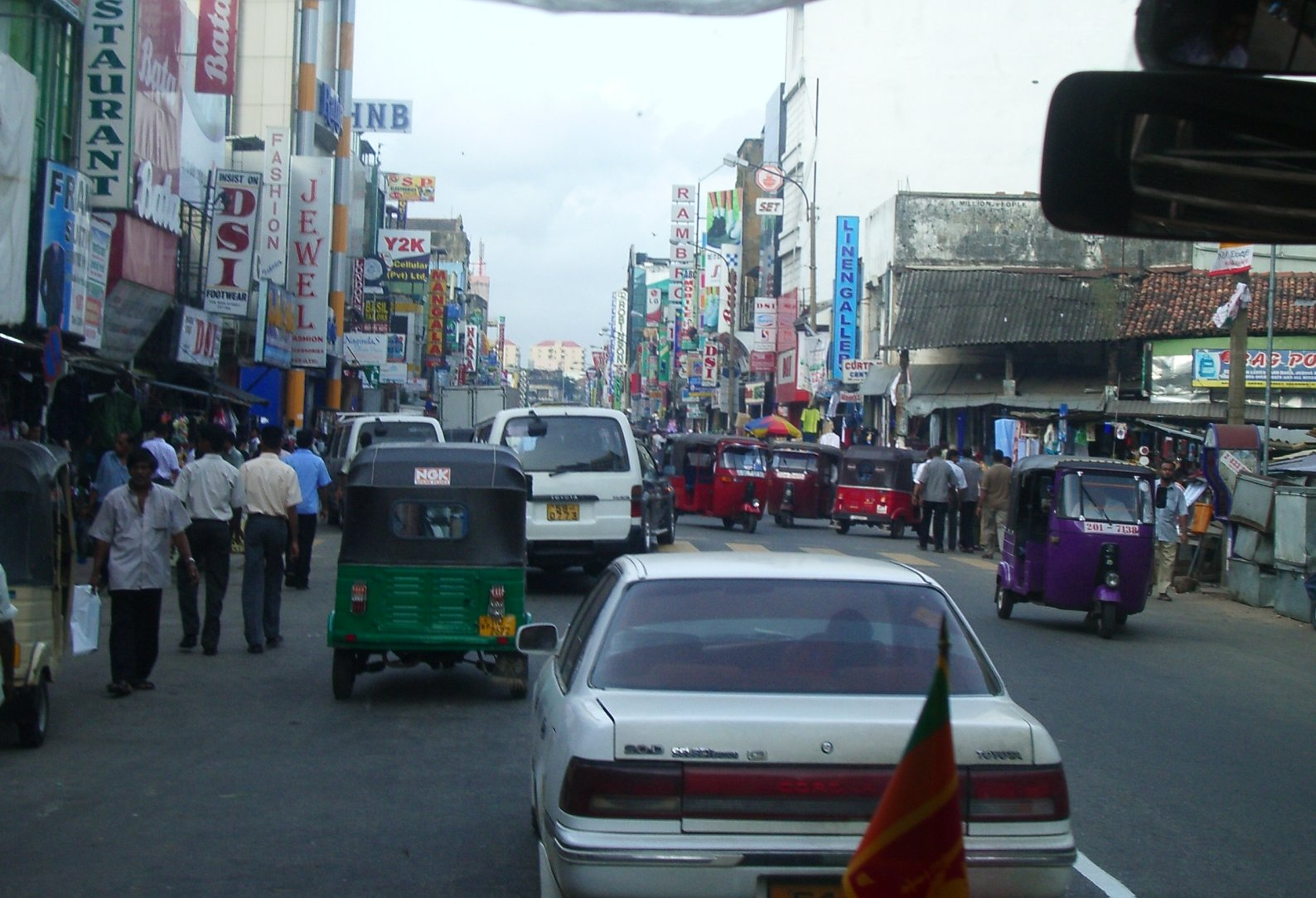 Barri comercial de Petah a Colombo, Sri Lanka; foto feta per J. Ollé el juliol del 2006